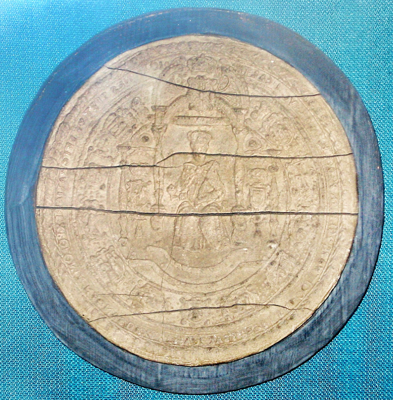 Печать Яна III Собесского